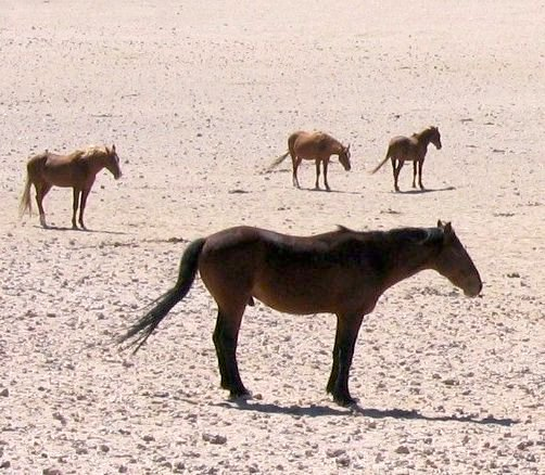 Wildpferde, Aus, Namibia